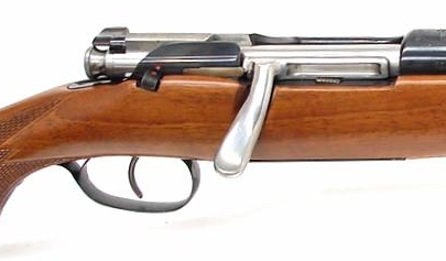 Mannlicher Schönauer GK mit Flintenabzug (Direktabzug).